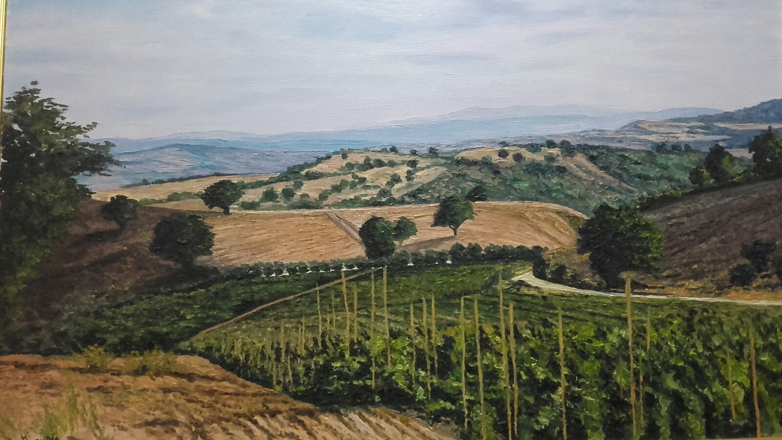 dipinto vigneto di Roccanova